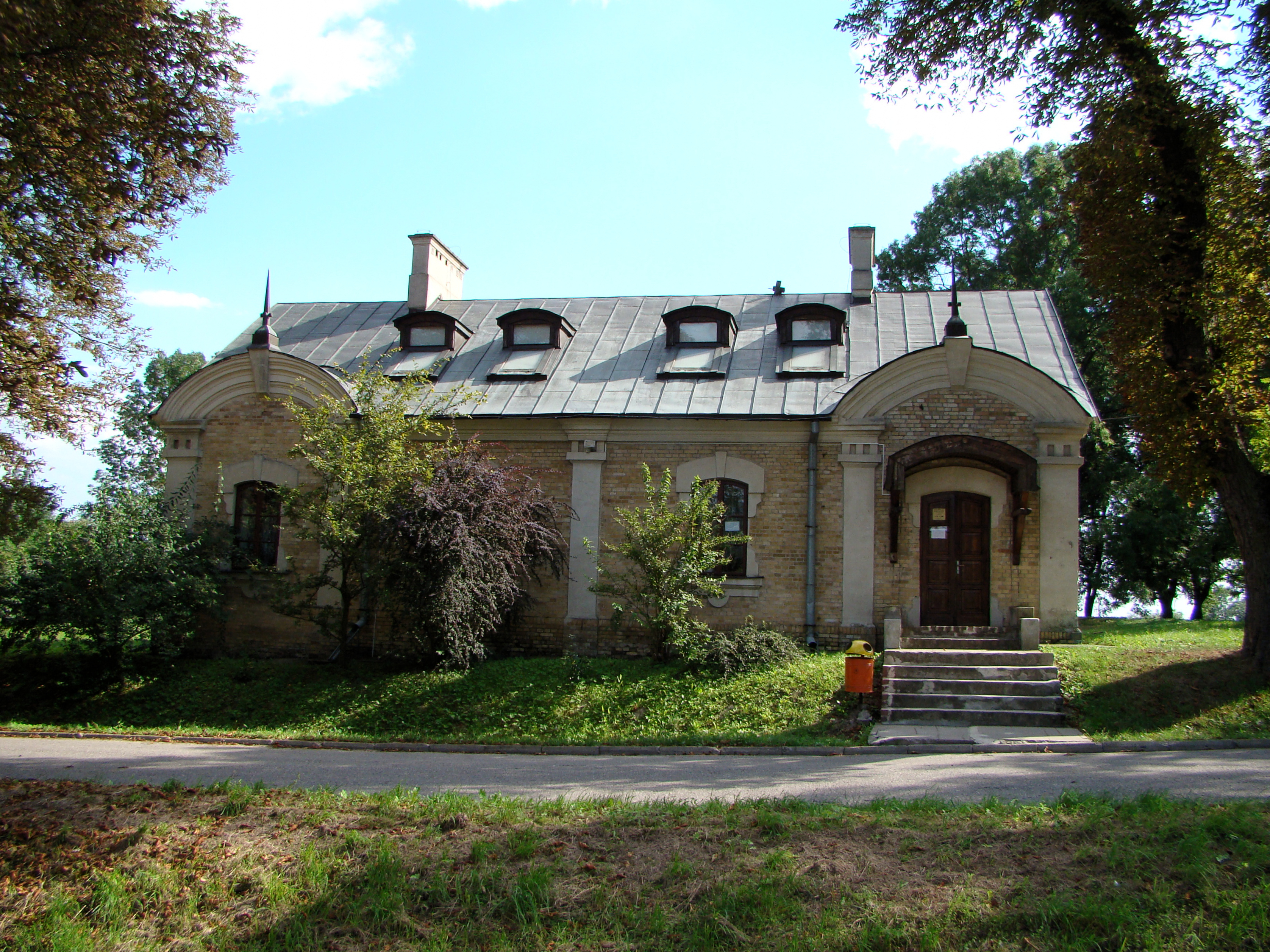 Palác Rastaweckých v Dołhobyczowě, Polsko